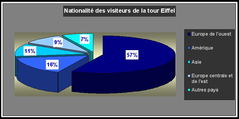 *Graphique montrant la nationalité des visiteurs de la tour Eiffel, d'après une enquêtre de l’institut de sondage TNS Sofres, réalisé en 1995. Fichier réalisé par moi-même (Utilisateur:Kuxu) sous Excel, puis importé sous paint.